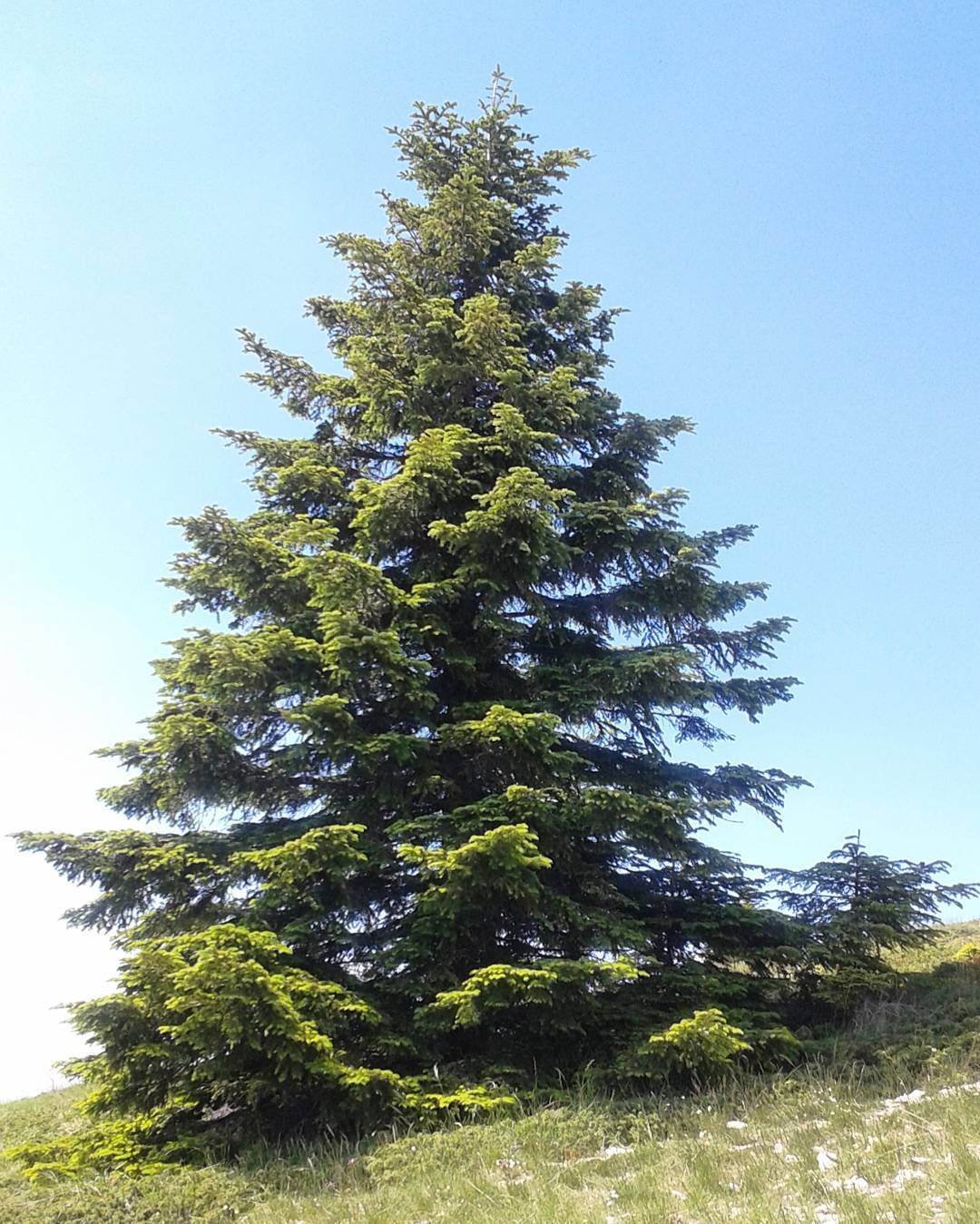 Sapin, montagne de Lure